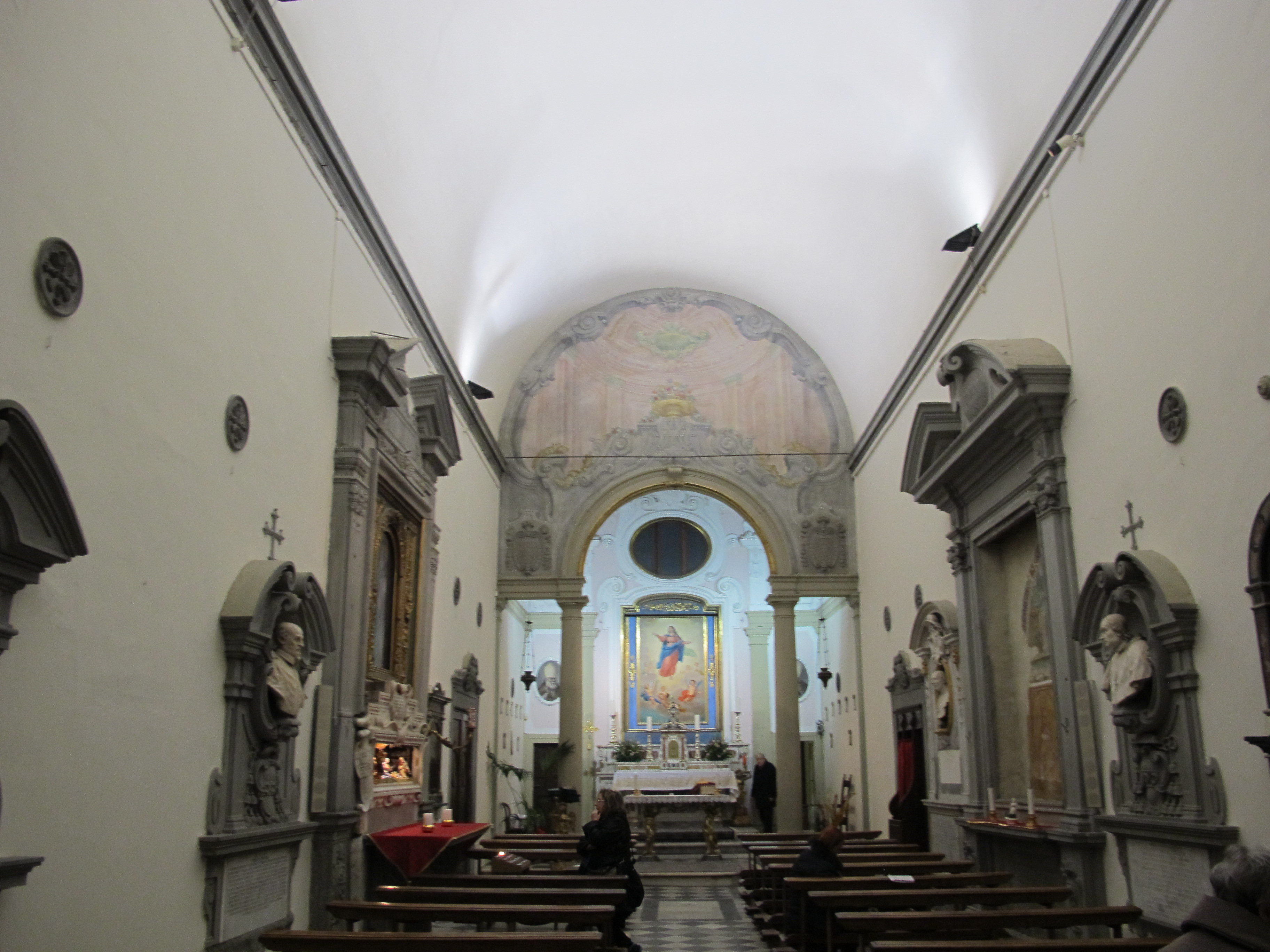 Santa maria in campo, interno 00.JPG